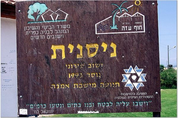 ניסנית התמונות באדיבות קטיף.נט (קישור) אתר האינטרנט של גוש קטיף. צילם: מוטי סנדר.